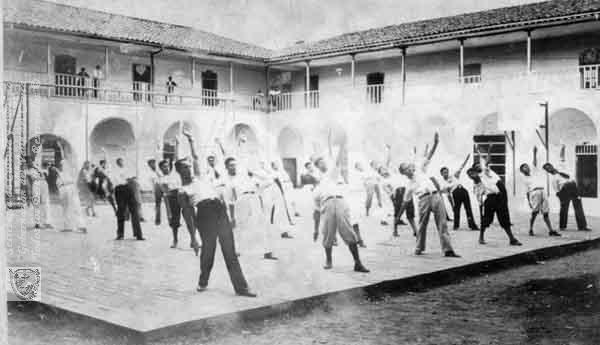 ESTUDIANTES SANTA LIBRADA EN CLASES DE EDUCACIÓN FÍSICA.(Antigua Sede Convento de San Agustín). Santiago de Cali, C. 1938. (1938). ESTUDIANTES SANTA LIBRADA EN CLASES DE EDUCACIÓN FÍSICA & 202483. SANTIAGO DE CALI: Biblioteca Departamental Jorge Garces Borrero.Tomado de (